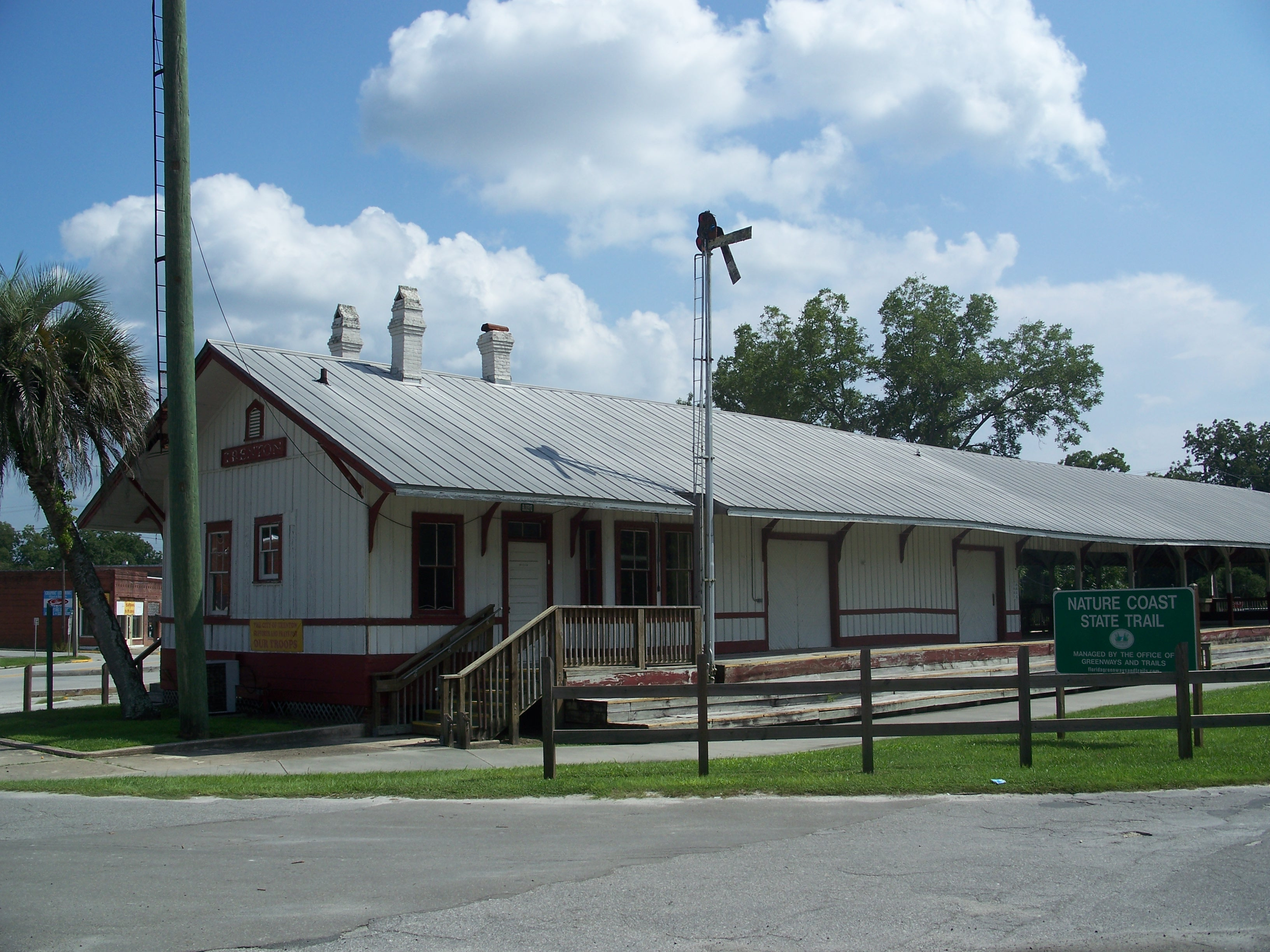 Trenton, Florida: Trenton Depot